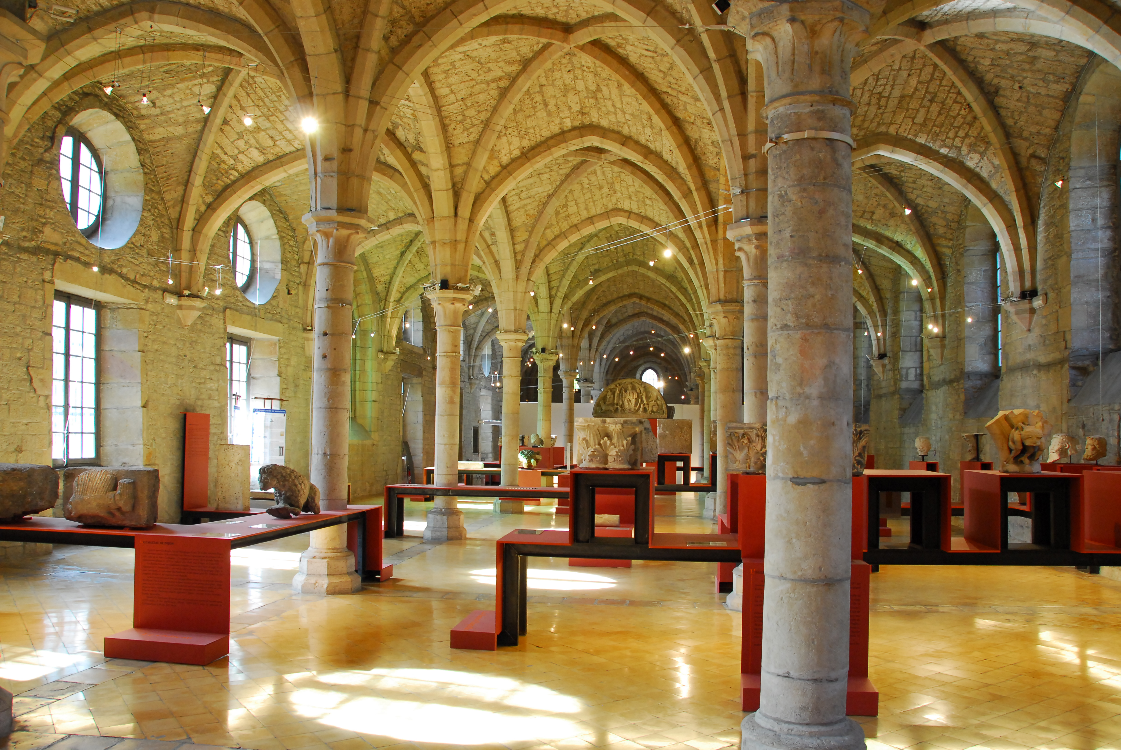 St-Bénigne, Kunstmuseum, Kapitelsaal